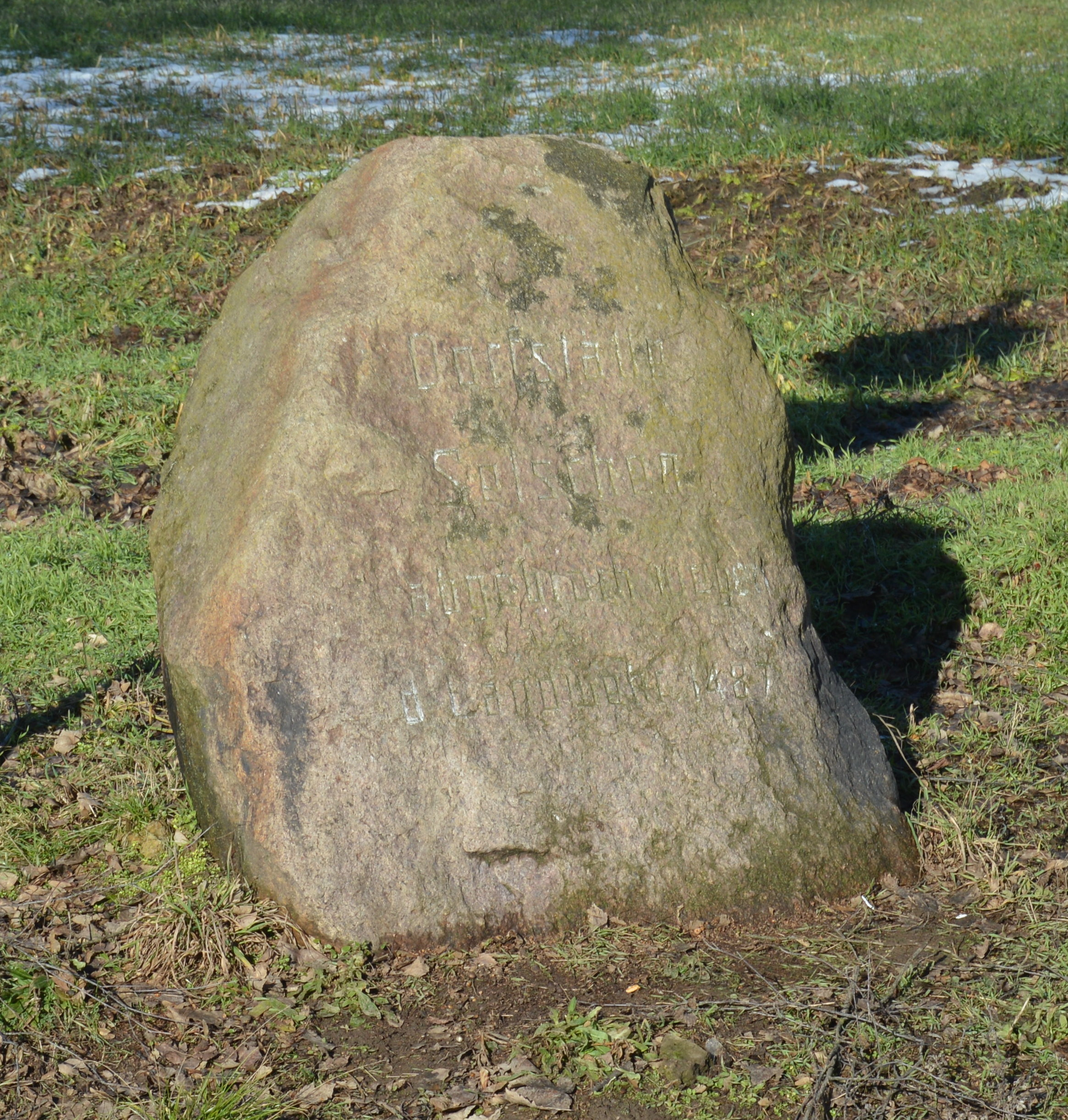 Gedenkstein Dorfstelle Selchen